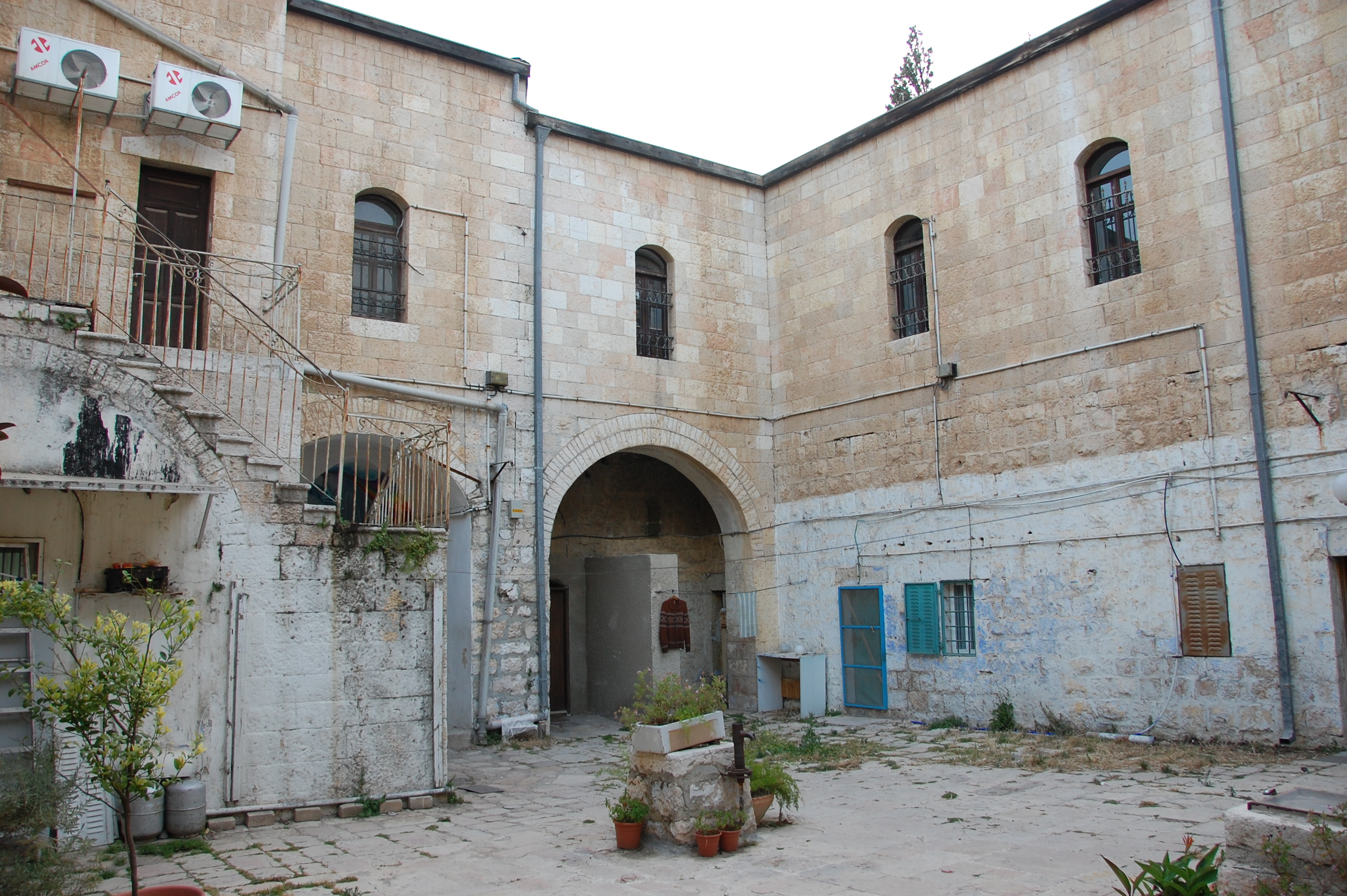 brit david, jerusalem